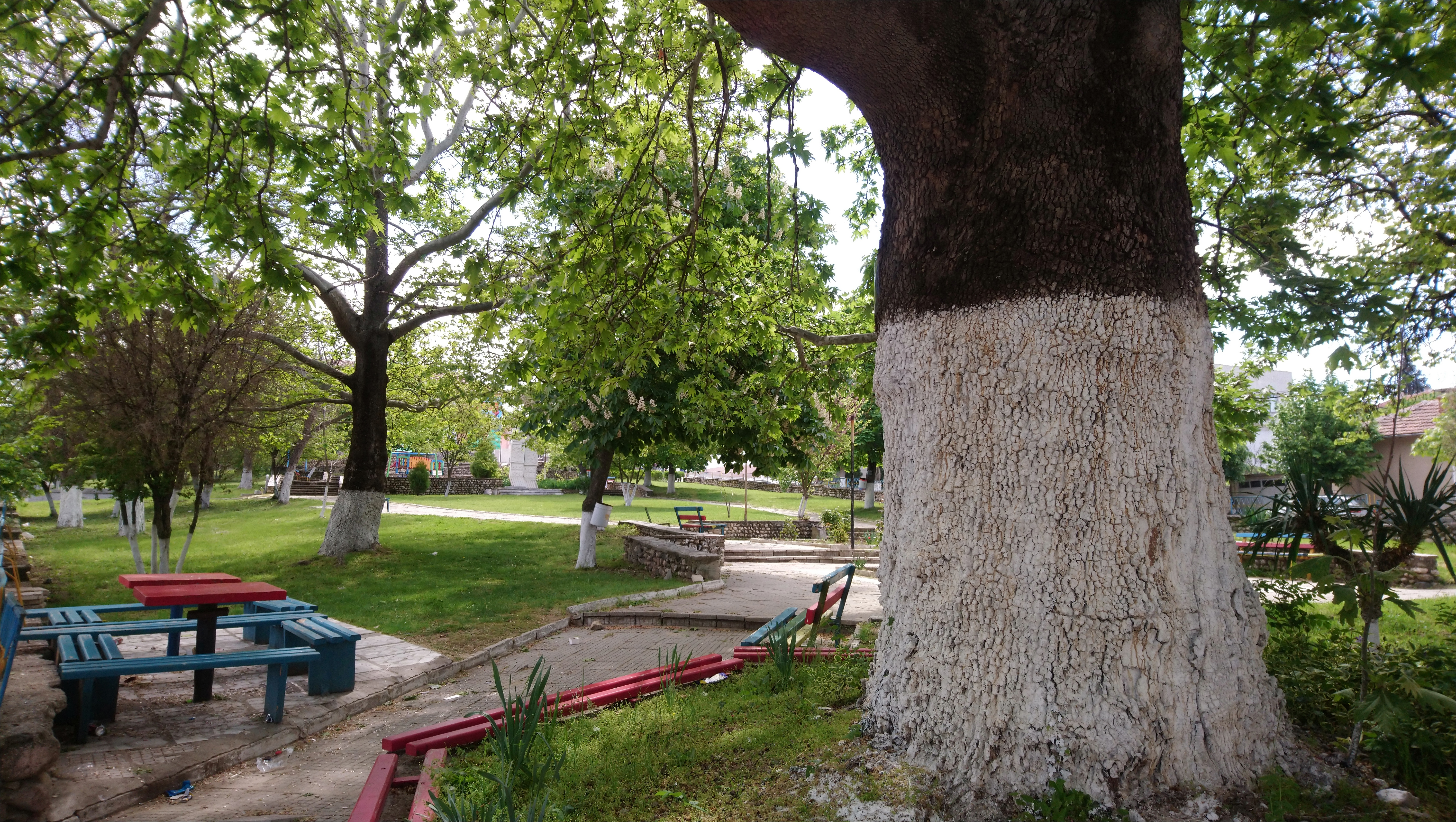 Паркът в центъра на село Марикостиново